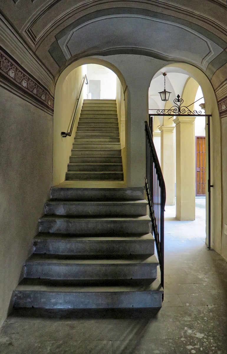 l'abitazione del mecenate del giovane Verdi